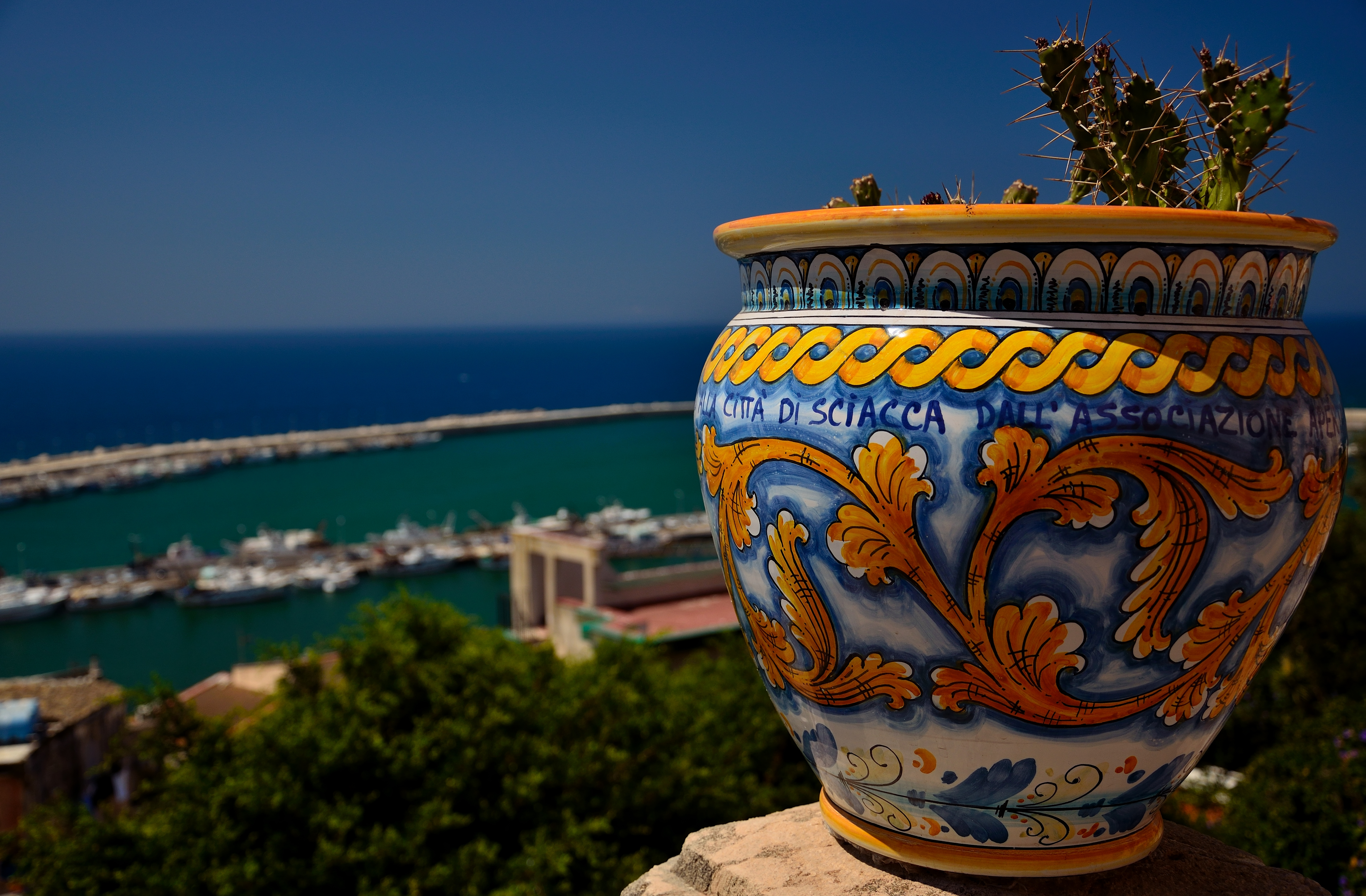 Italia - Sicilia 2015